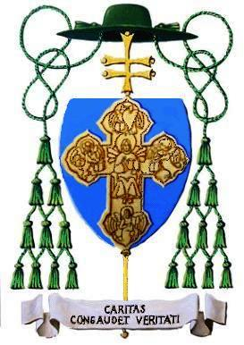 Stemma dell' Arcivescovo Cesare Nosiglia